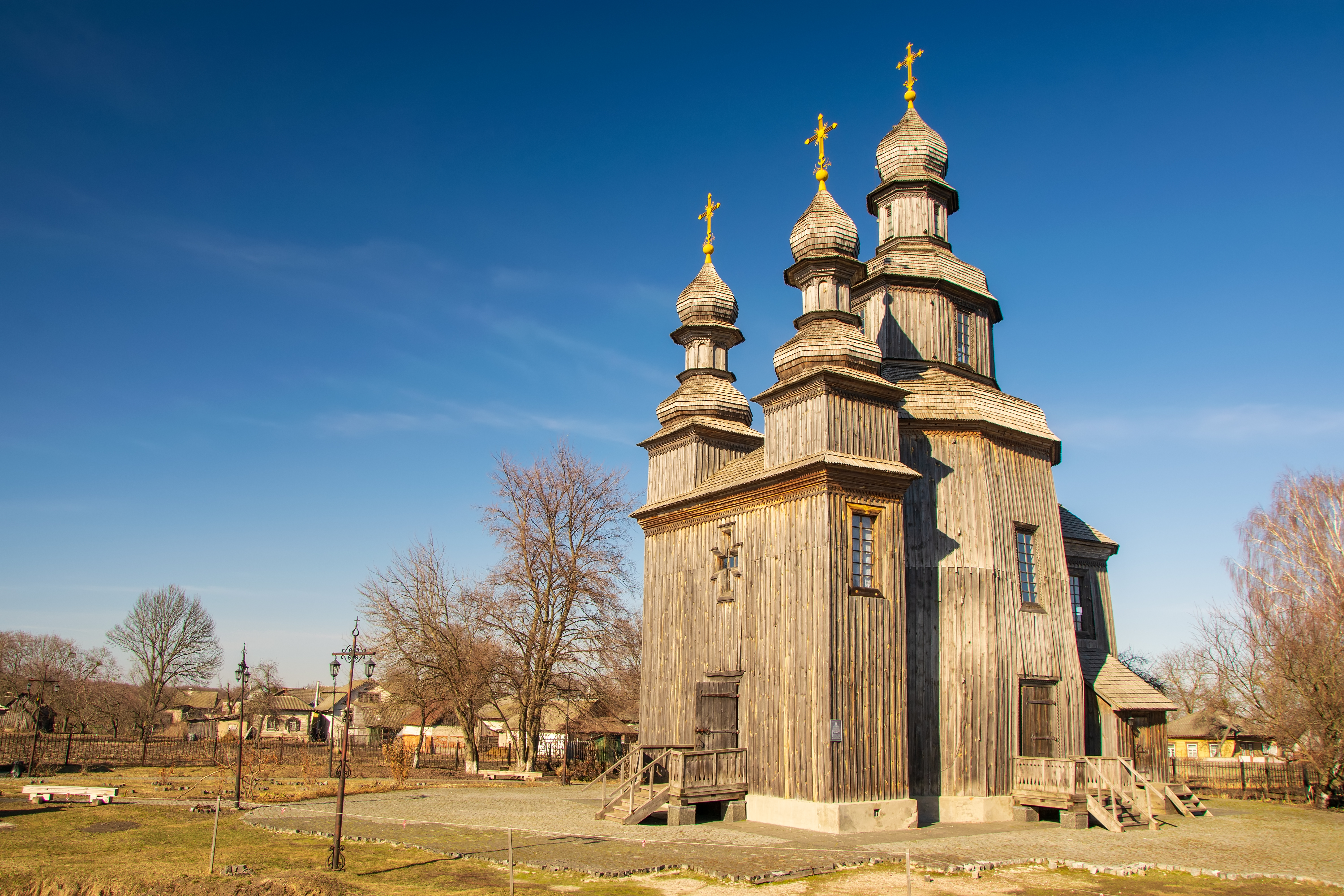 Георгіївська церква (дер.), Седнів